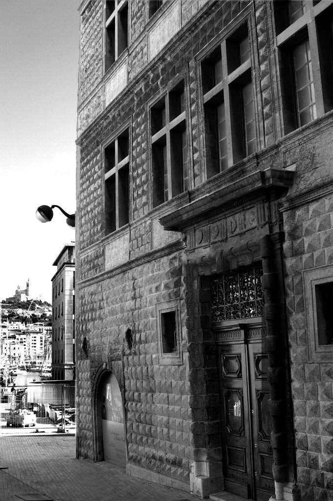 Vue de la Maison Diamantée à Marseille avec en arrière plan Notre-Dame de la Garde.